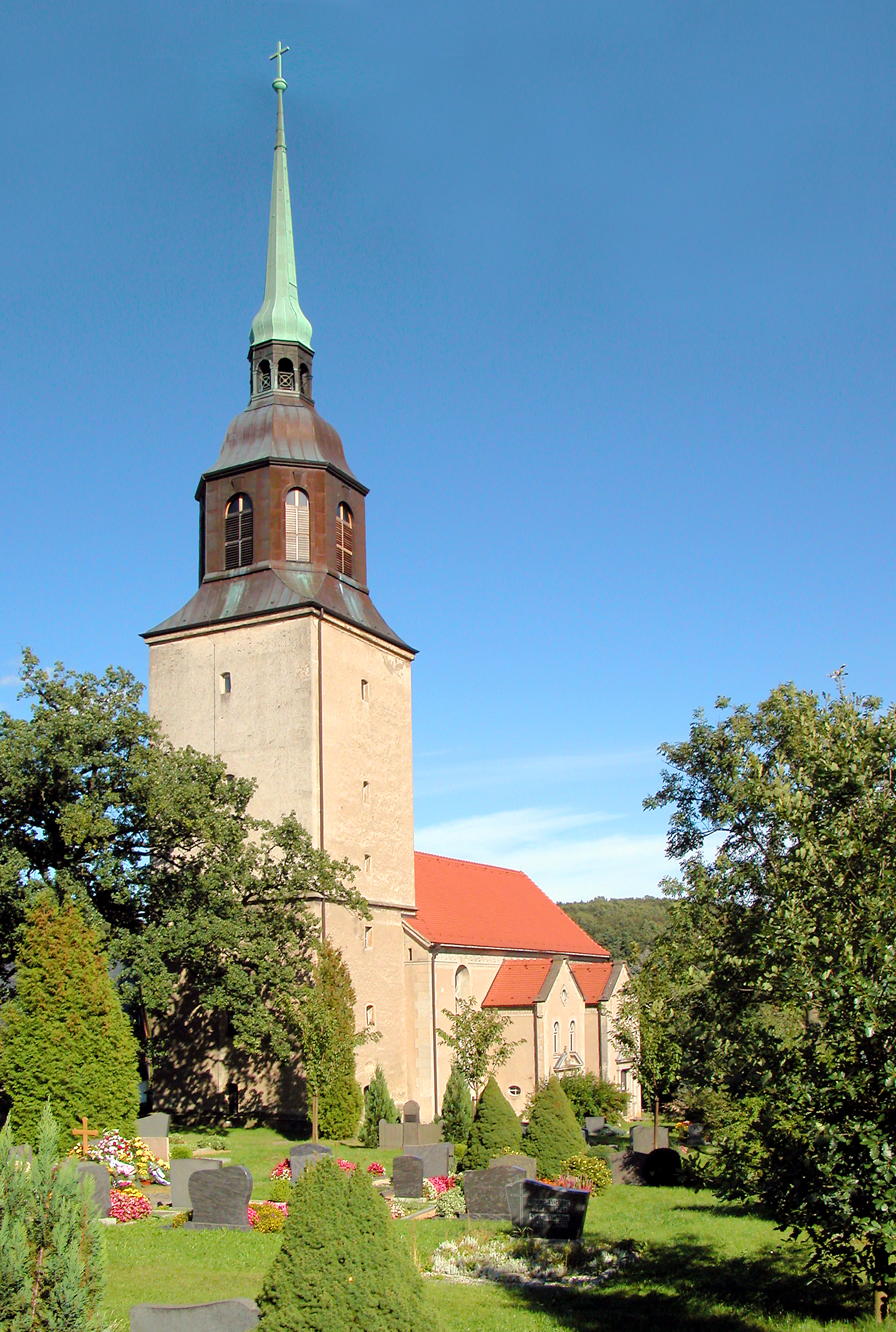 12.09.2011 09627 Oberbobritzsch (Bobritzsch-Hilbersdorf), Kirchstraße (GMP: 50.875369,13.453209): Dorfkirche St. Nicolaus. Sicht von SW. Erstmals 1392 erwähnt. Im Kern mittelalterlich, 1710 erneuert, Äußeres im 20. Jh. entstellt. Sechsflügeliger Schnitzaltar von 1521 von einen unbekannten Freiberger Künstler. [DSCNn2737&39.TIF]201109122300MDR.JPG(c)Blobelt